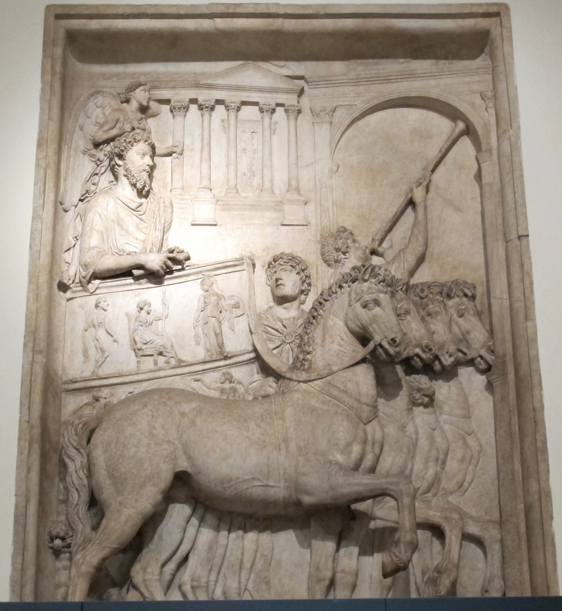 Musei Capitolini